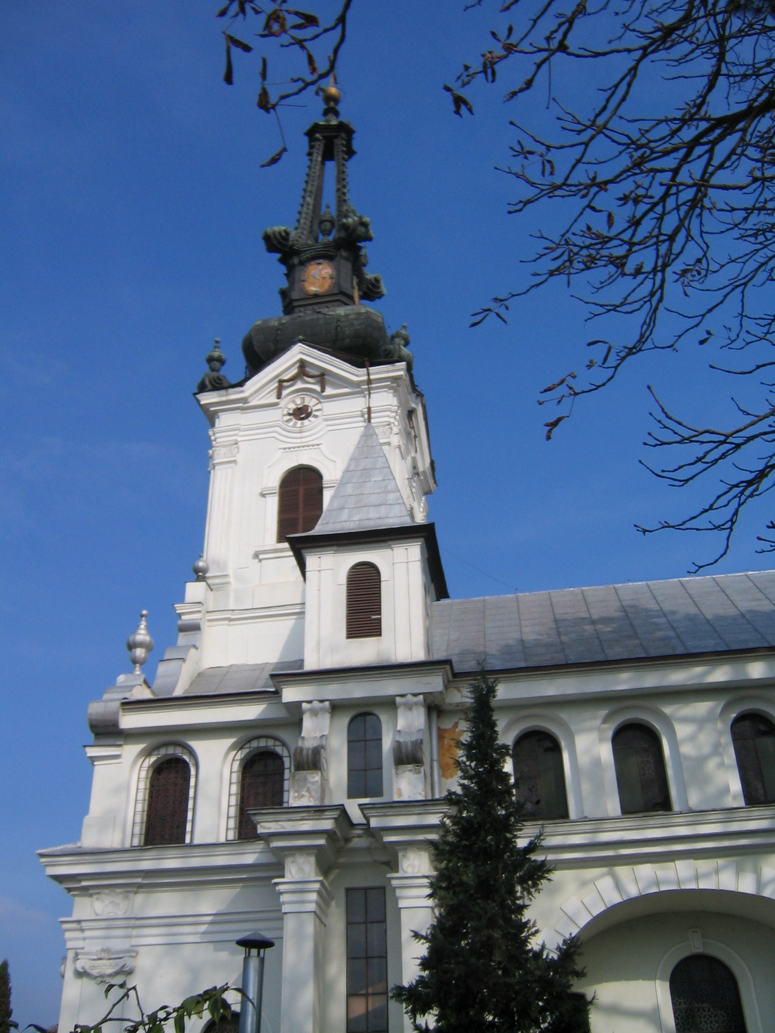 Biserica Ortodoxa Lipova